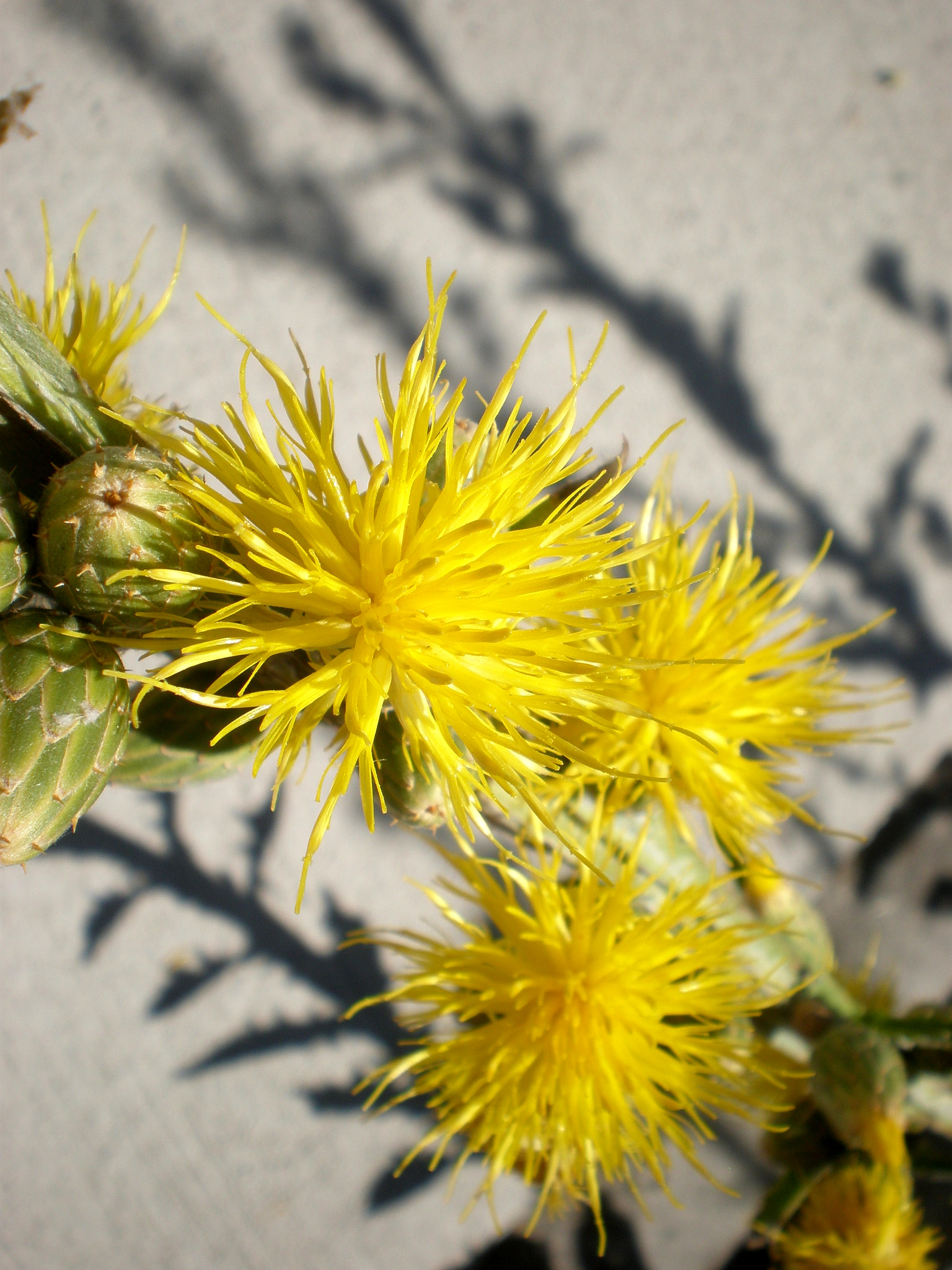 Jardín Botánico de Barcelona.